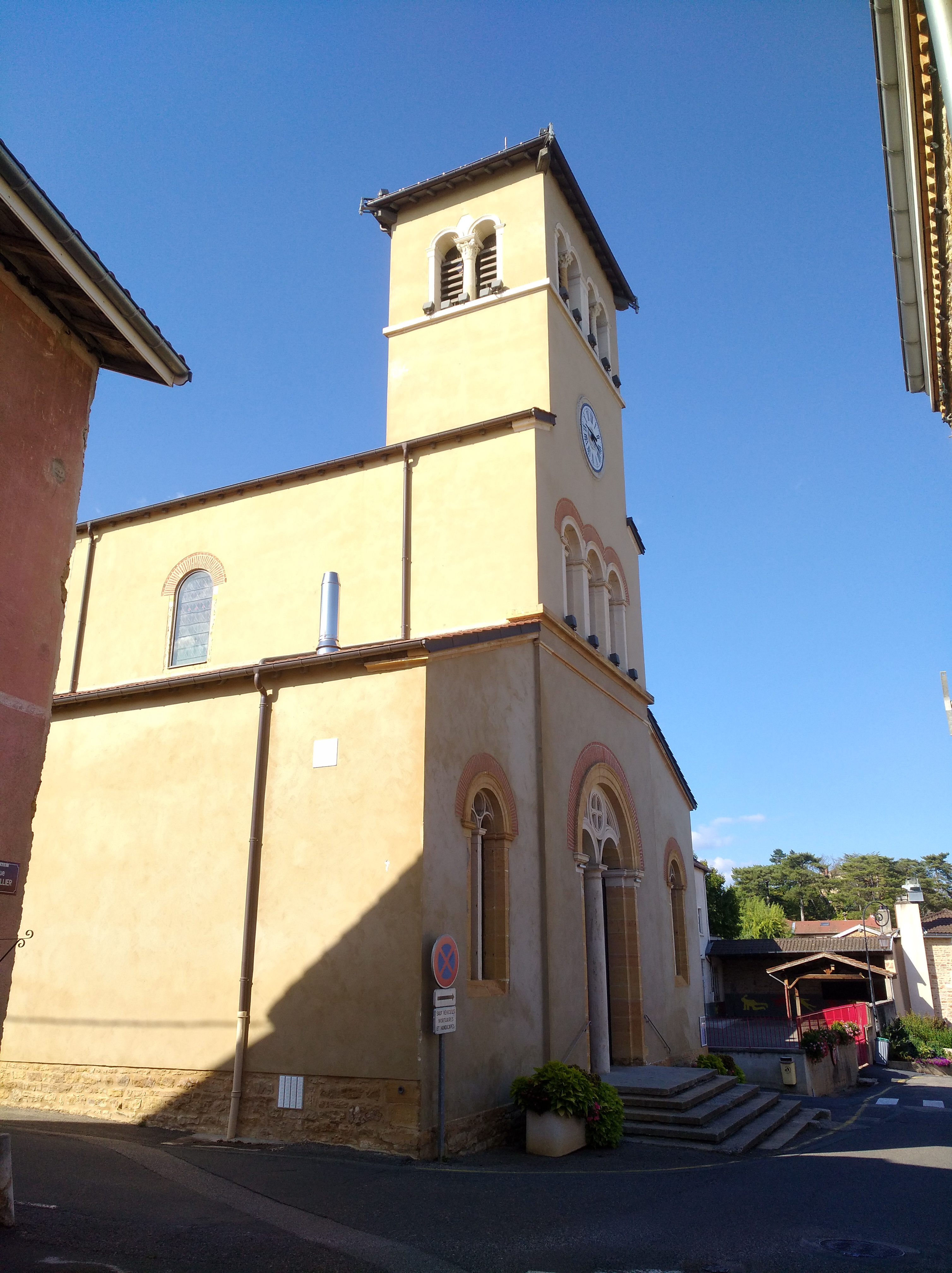 Église Saint-Claude de Blacé, dans le département du Rhône.